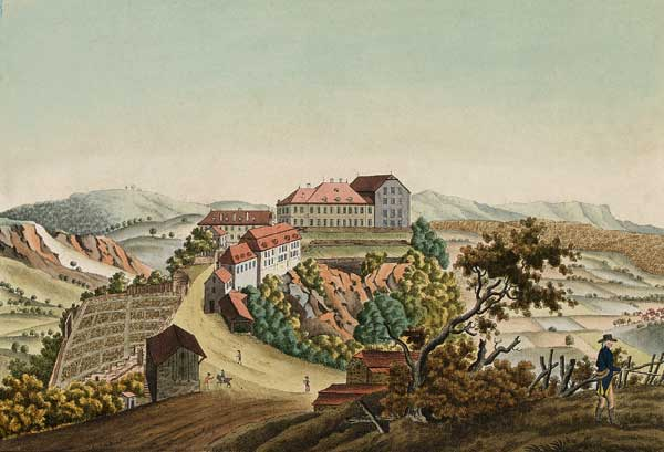 Schloss Thorberg, kolorierte Umrissradierung von C. Wolff Weber, 21 x 30,5 cm